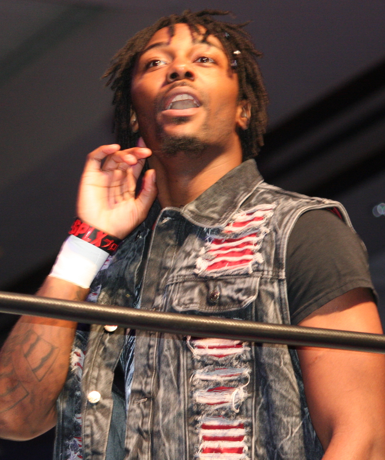 Le catcheur Shane Strickland en 2017